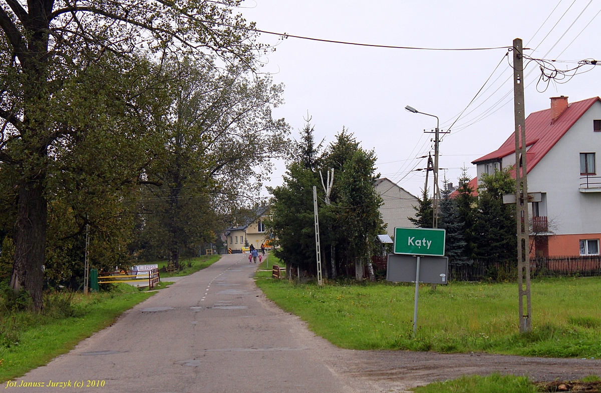 Kąty